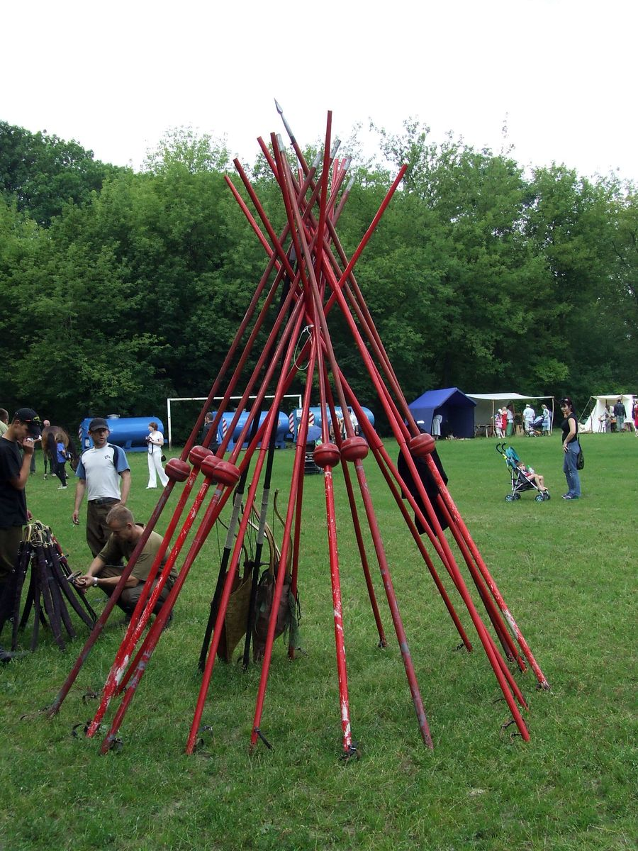 Kopie husarii, współczesna rekonstrukcja (Park Skaryszewski w Warszawie, rekonstrukcja bitwy o Warszawę)